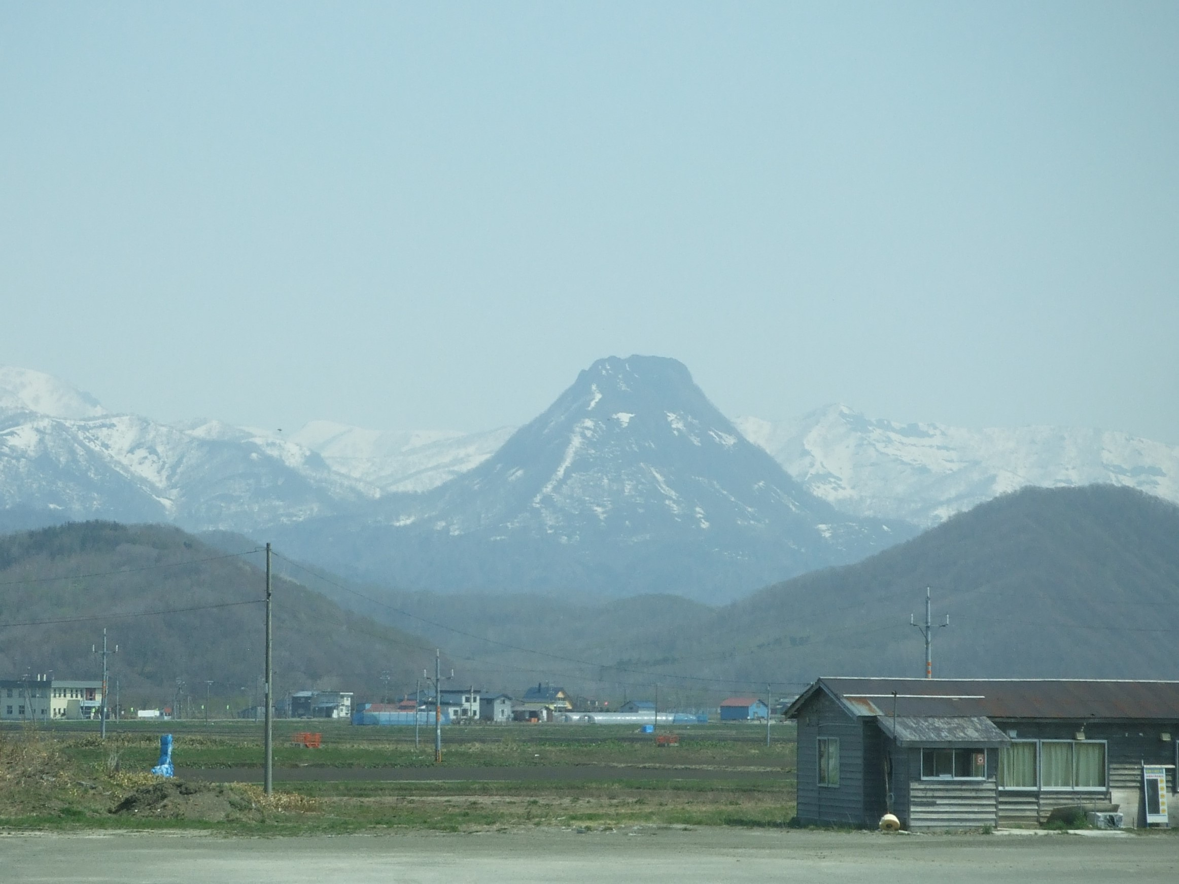 北海道石狩市浜益区にある黄金山